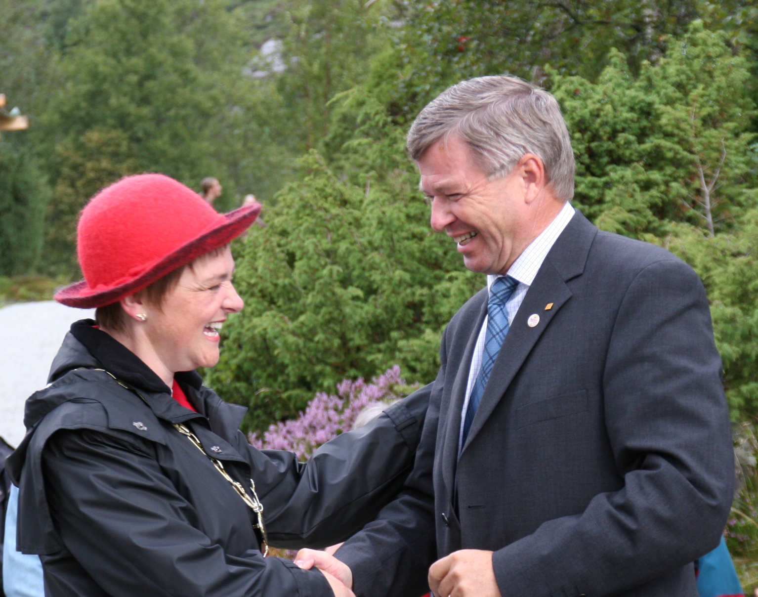 Trude Brosvik og Kjell Magne Bondevik